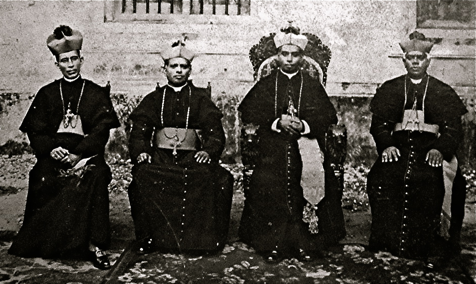 Biskupi syromalabarscy, od lewej: Francis Vazhapilly, Thomas Kurialacherry , Augustine Kandathil i Alexander Chulaparambil